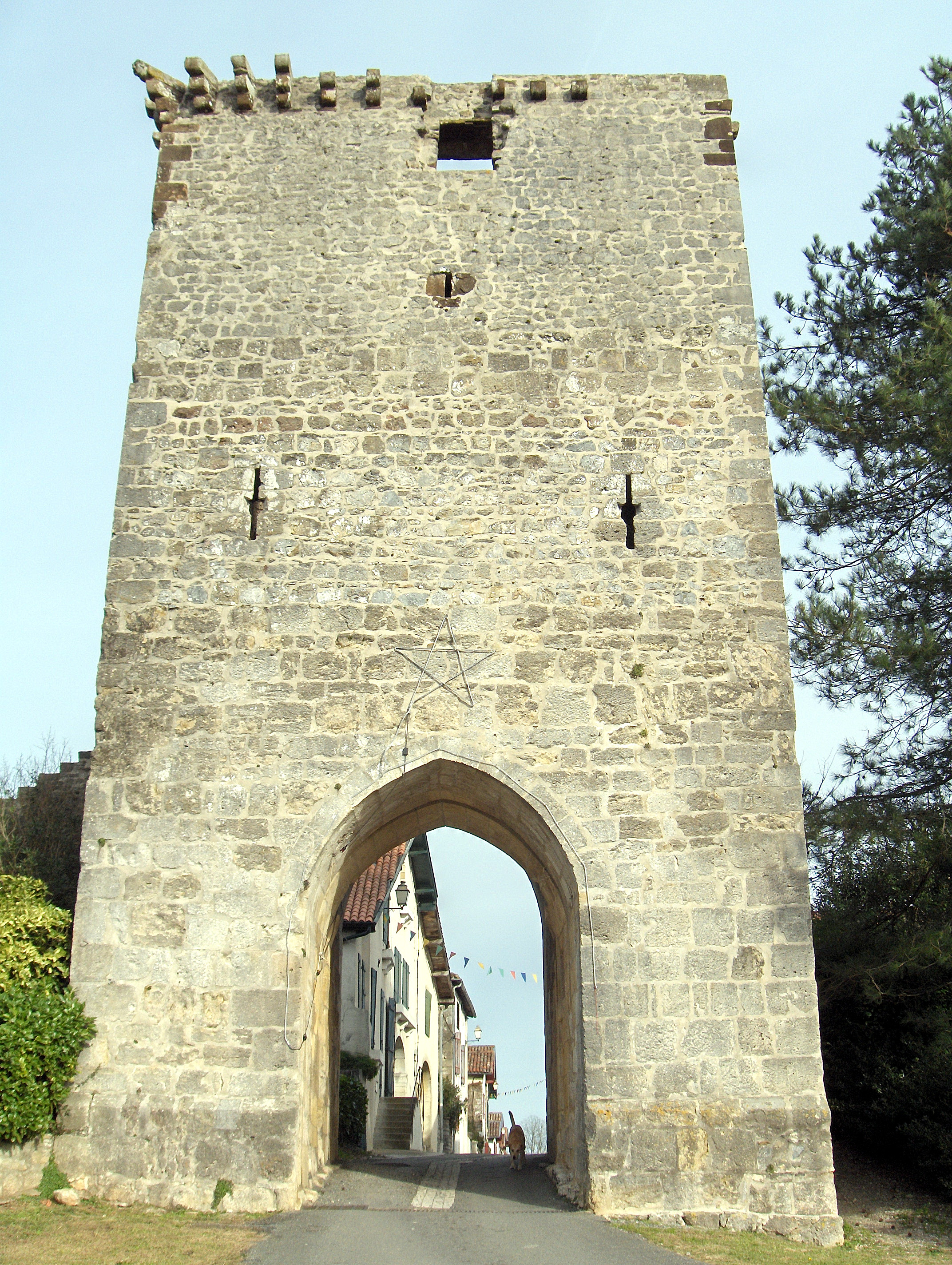 Tour d'Hastingues, bastide des Landes, France.